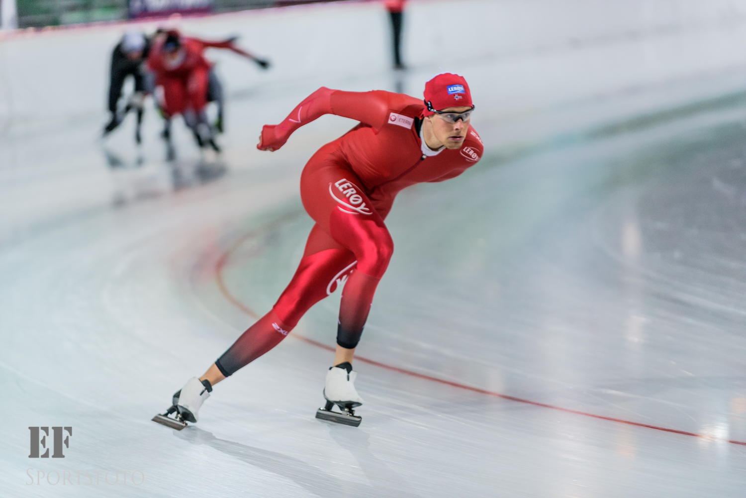 Landslagstrening i Vikingskipet